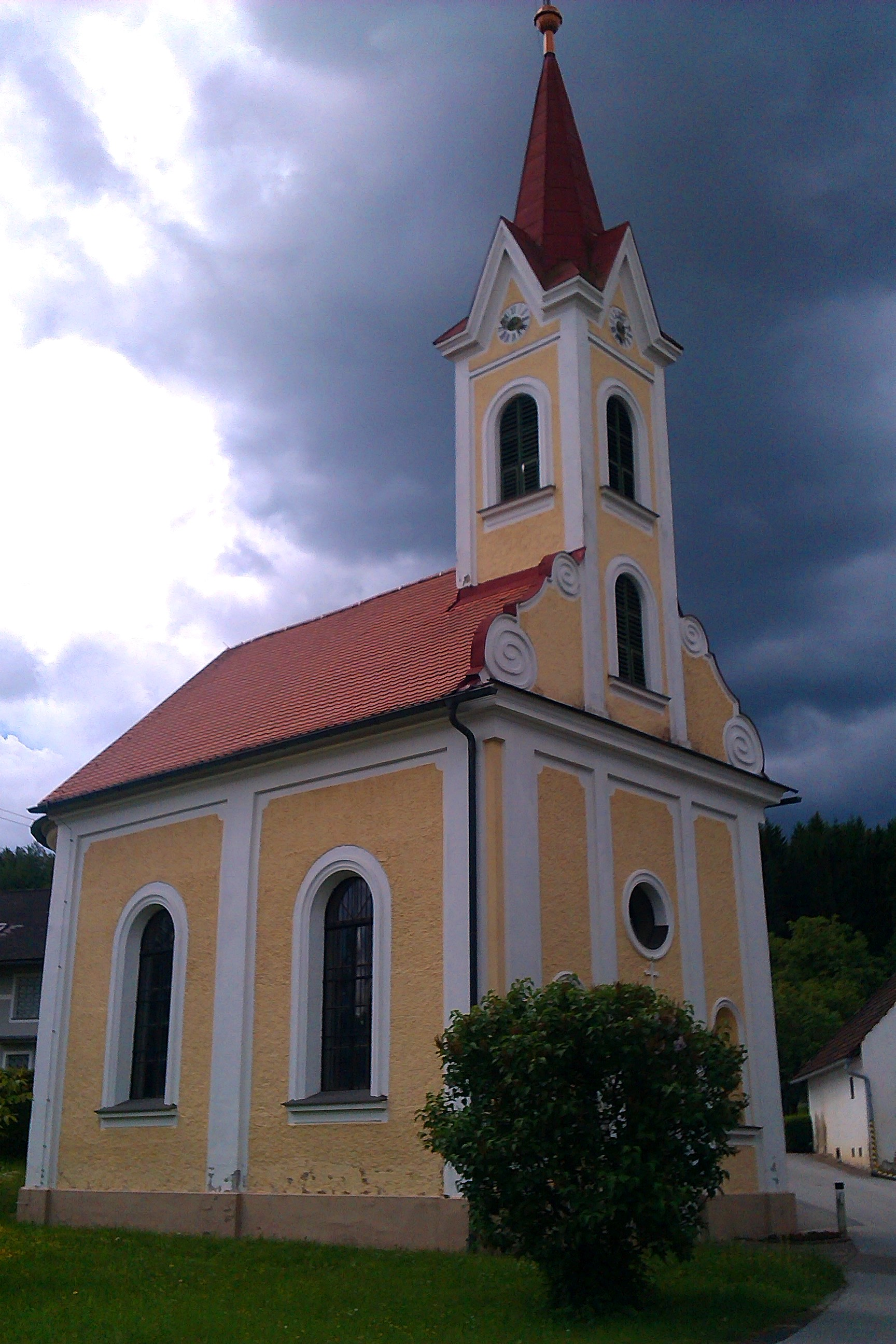 Ortskapelle Zur Kreuzerhöhung